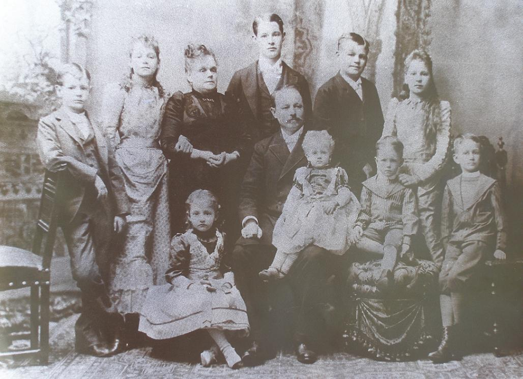 Familia Ebner Bielefeld en 1890 (circa) Parados de izquierda a derecha. Andrés 2do, Carolina, doña Caroline, Maximiliano, Alejandro y Amelia. Sentados de izquierda a derecha: Elena, Don Andrés, Antonia, Augusto y Arturo. Licensing Esta imagen ha sido copiada del álbum familiar de Armin Ebner, quien es su autor y la ha cedido para uso publico en concordancia con la licencia descrita abajo.